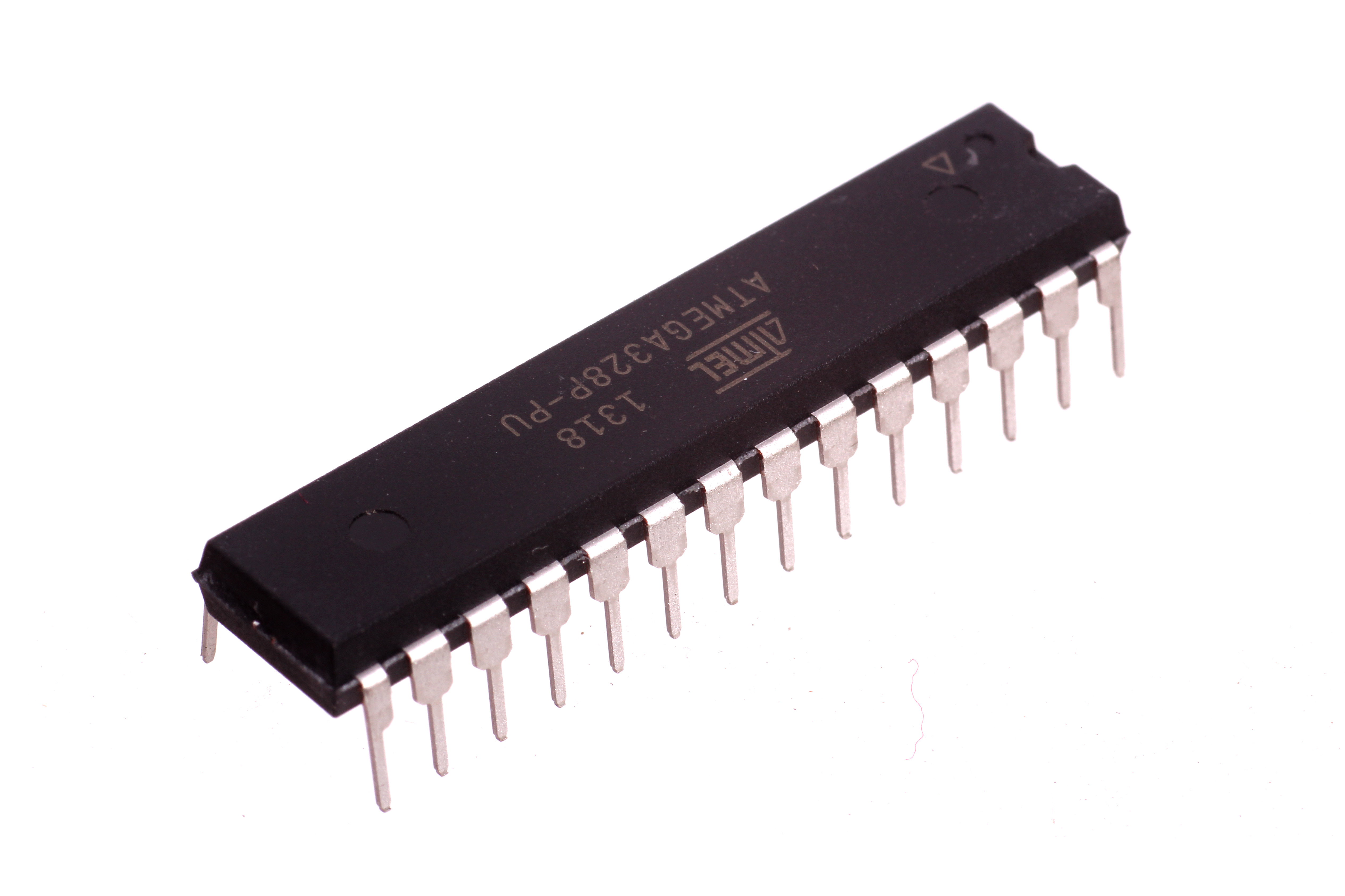 ATmega328P-PU.